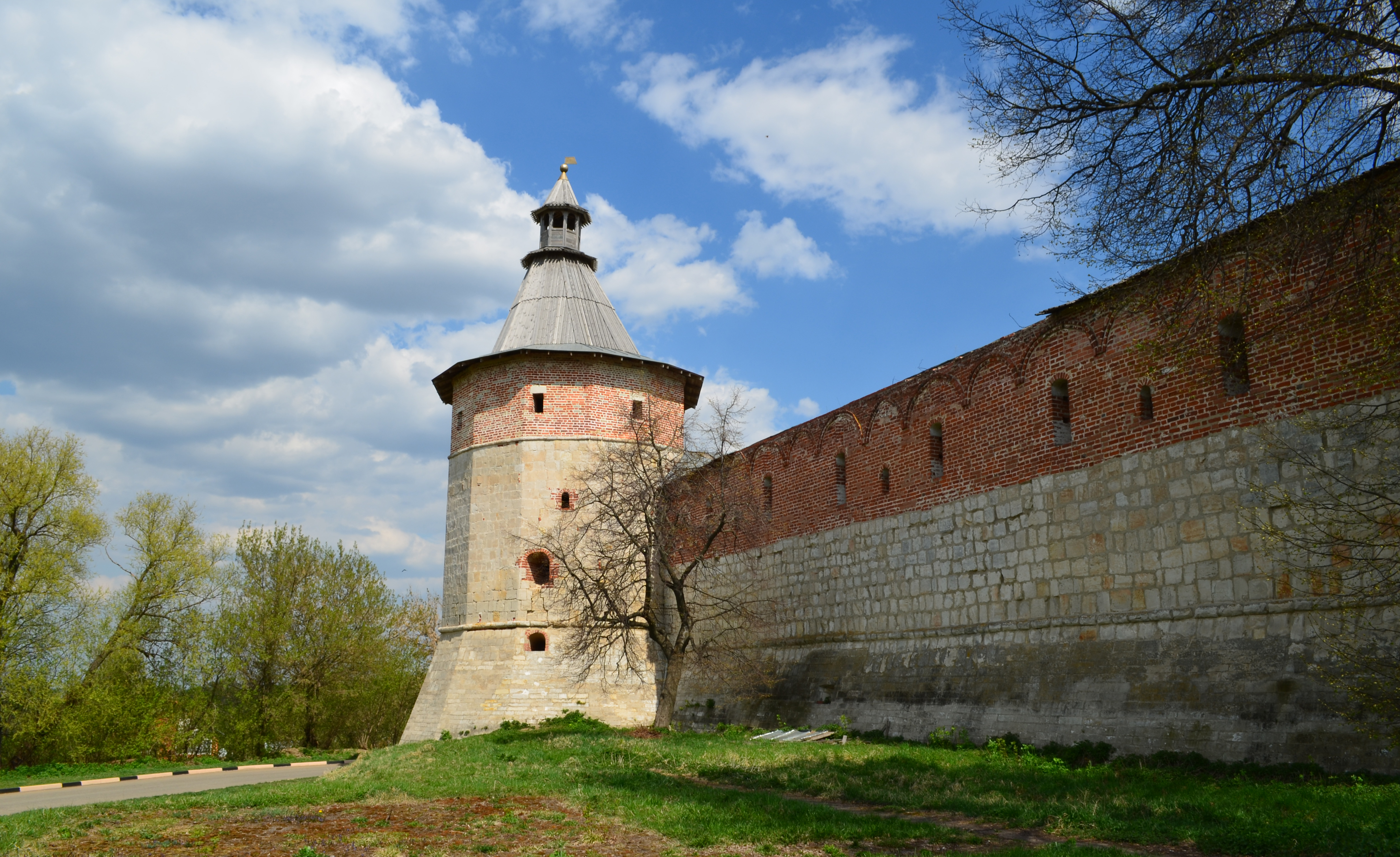 Зарайский кремль.Караульная башня.1528-1531 гг.